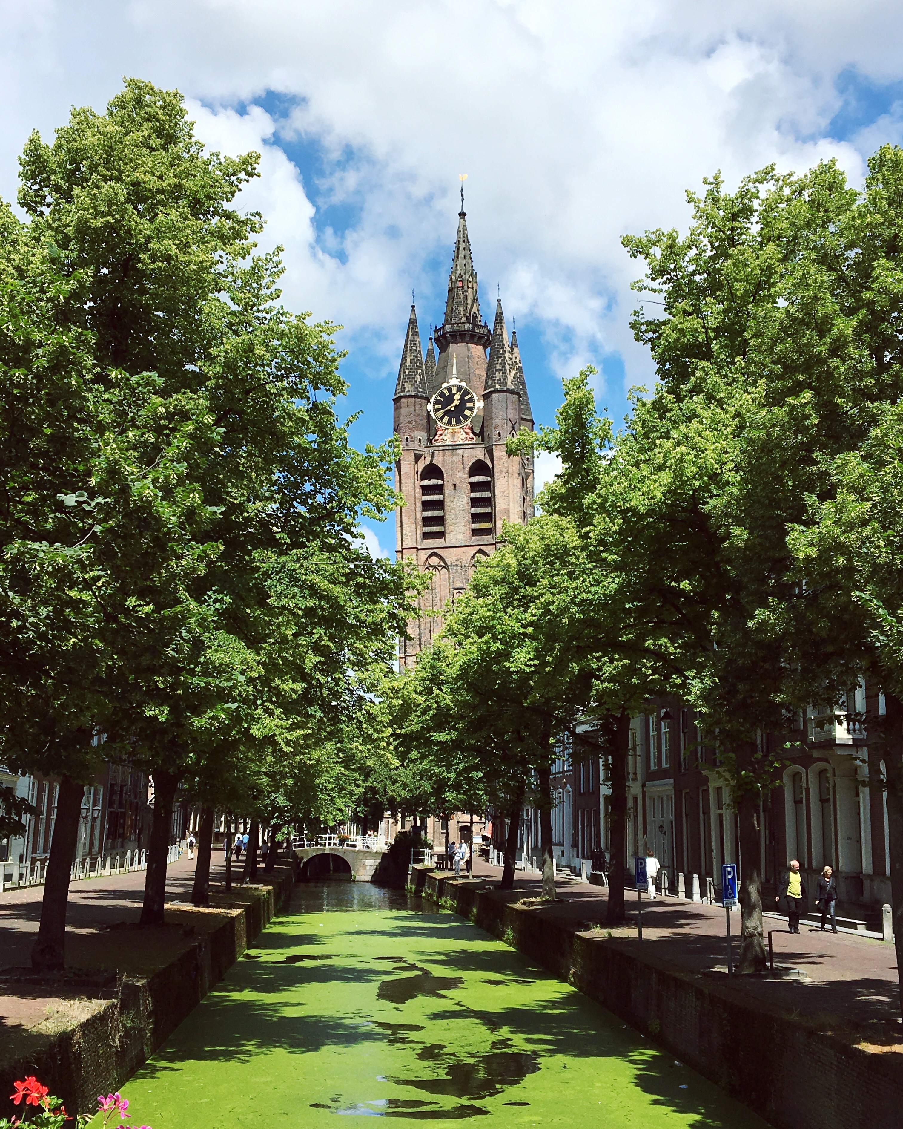 העיר דלפט בהולנד.